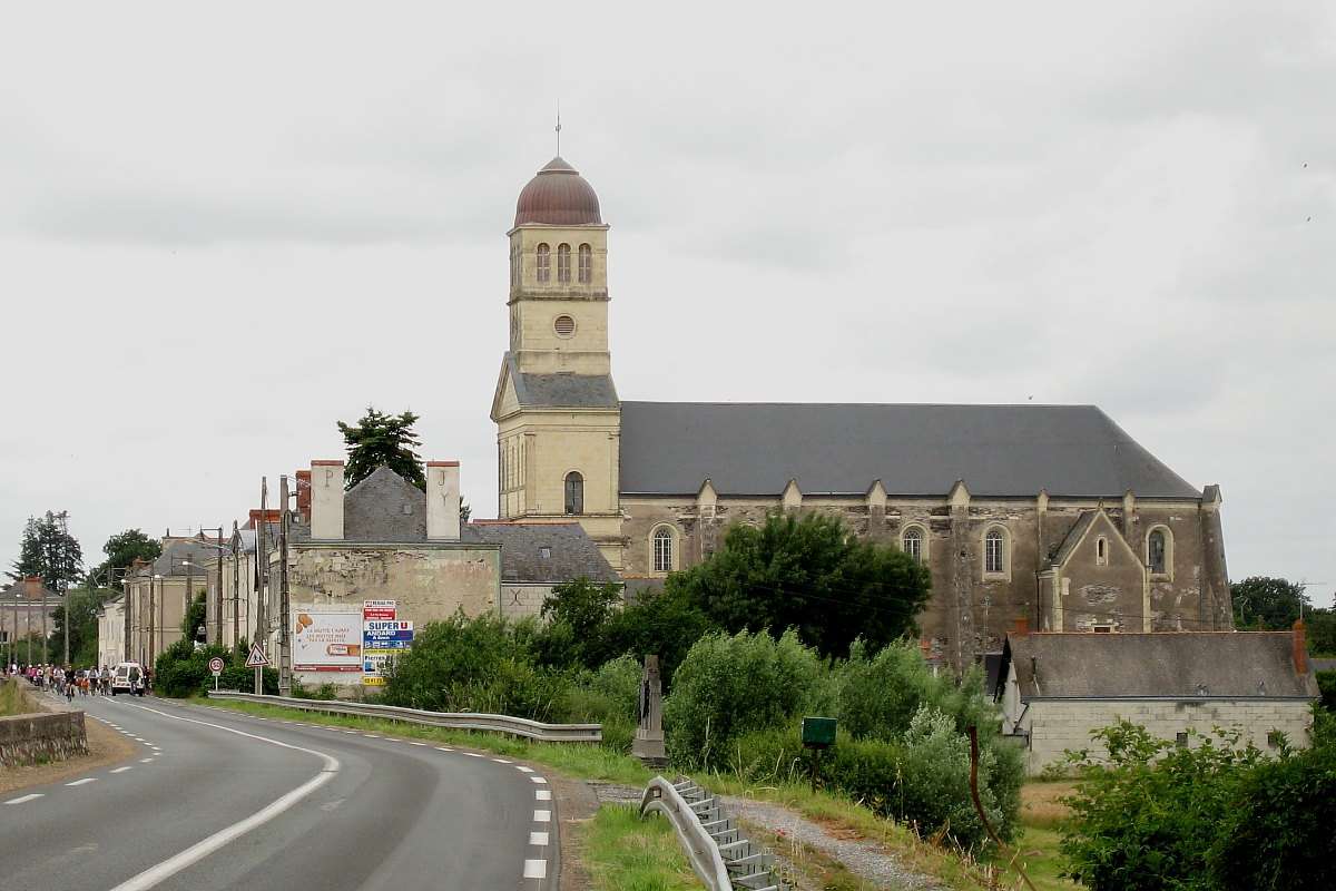 Vue de la monumentale église Saint-Aubin de La Bohalle depuis la Levée Jeanne de Laval